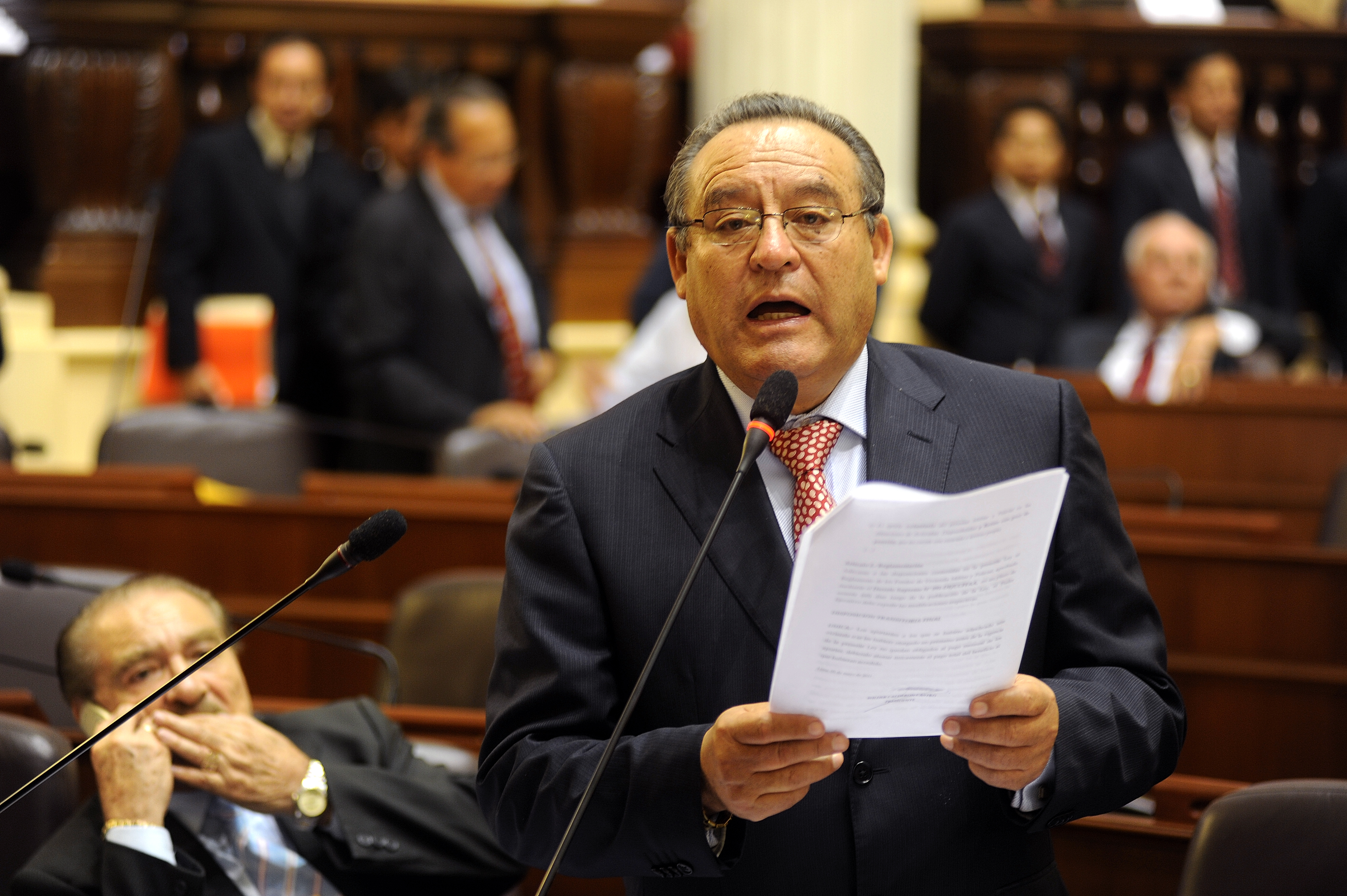 El legislador Wilder Calderón fija su posición en el debate parlamentario realizado esta tarde por el Pleno.